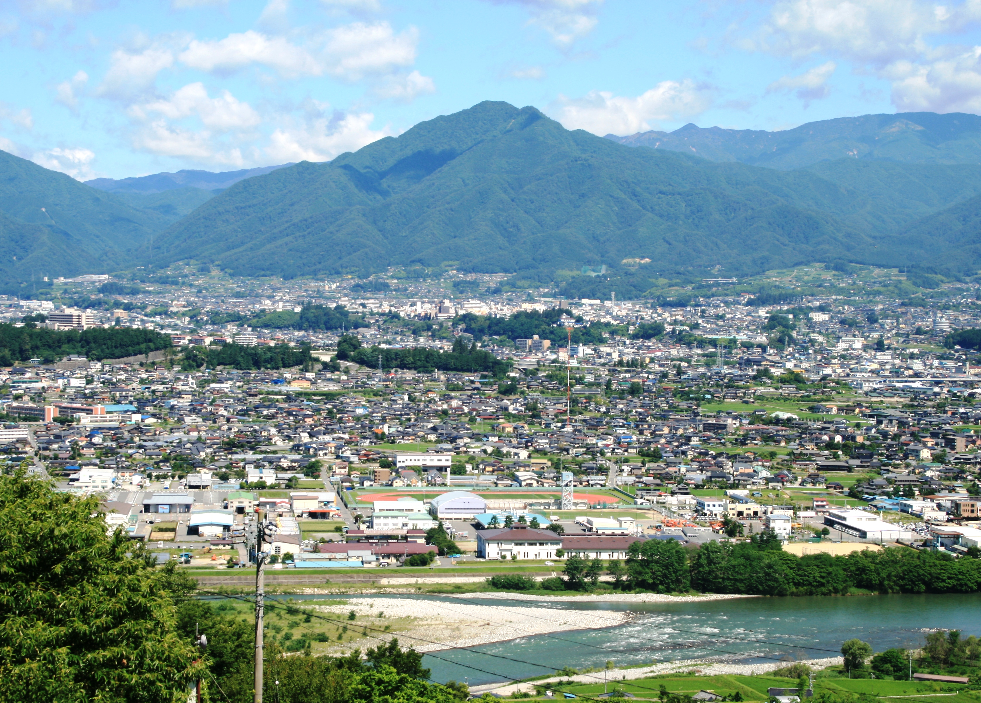 風越山を遠くから撮影したものです。